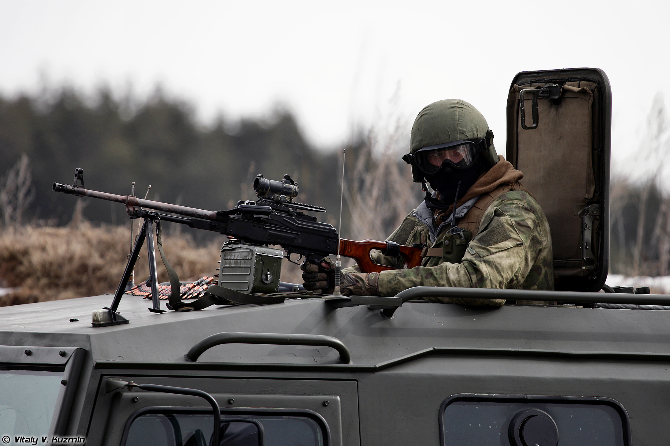 Военнослужащий 604-го ЦСН Витязь ВВ МВД России